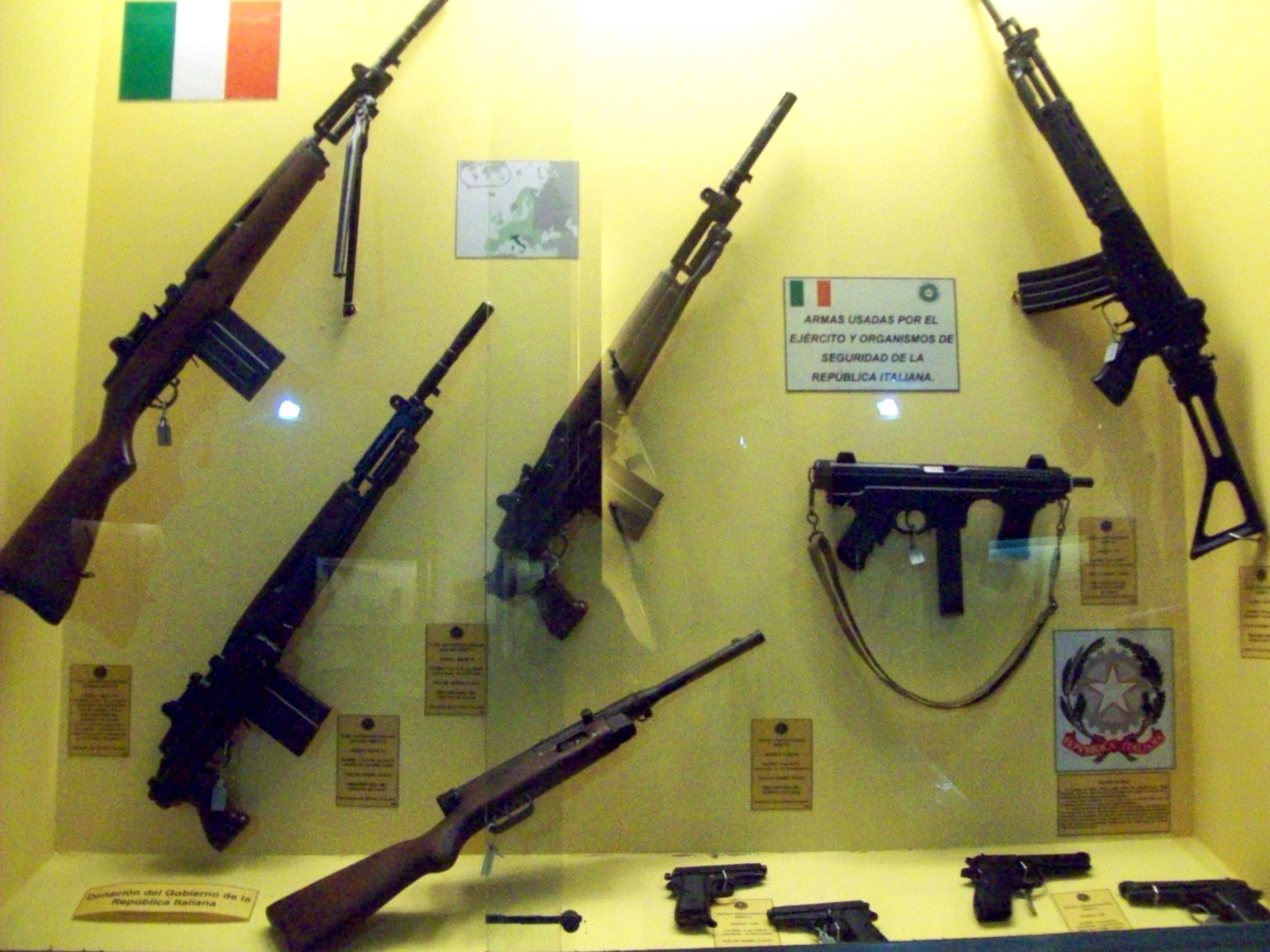 Armamento expuesto en el Museo de Armas de la Nación, ciudad de Buenos Aires, Argentina 2014.